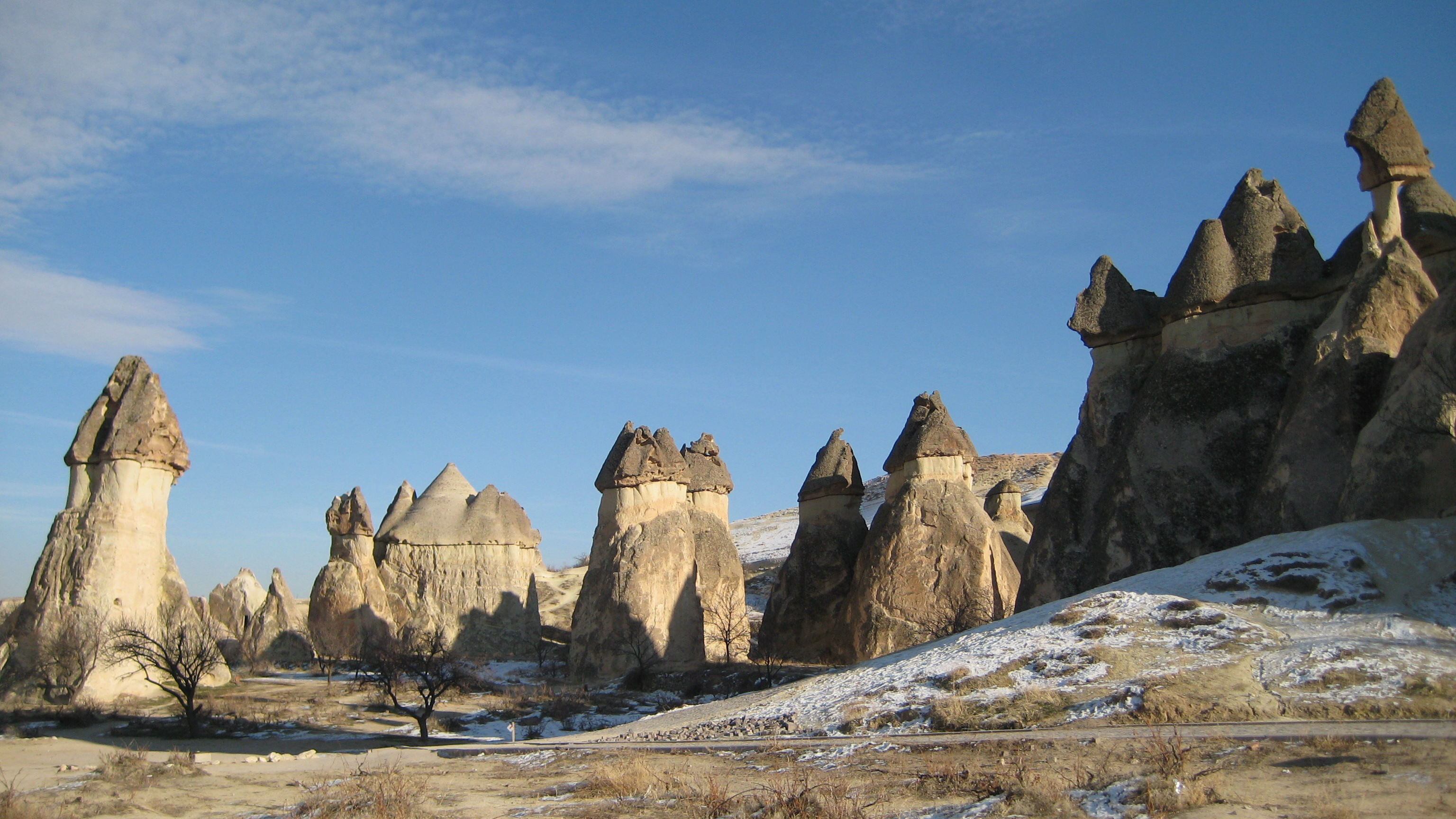 View of Paşa Bağlari